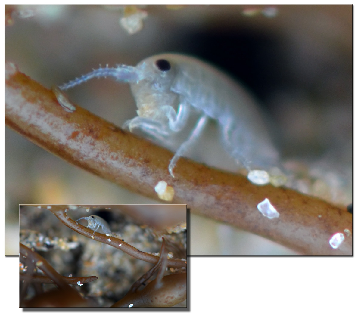 Jeune talitre (Talitrus saltator), en train de manger la cuticule d'une algue (fucacée), sur la plage de la Palue, près du Cap de la Chèvre, sur la presqu'île de Crozon, dans le Finistère (Ouest de la France).